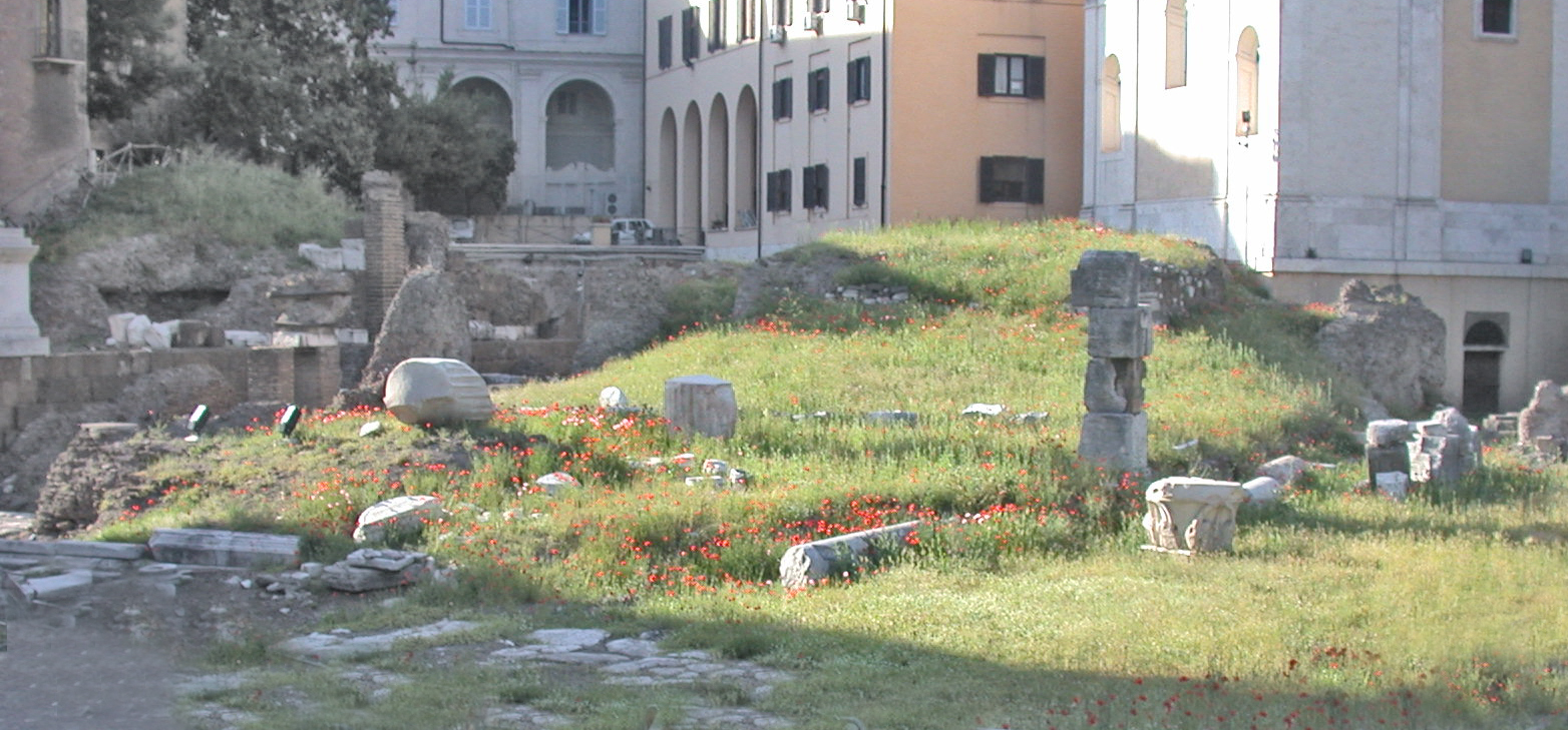 Roma, resti del podio del tempio di Bellona (presso il teatro di Marcello)